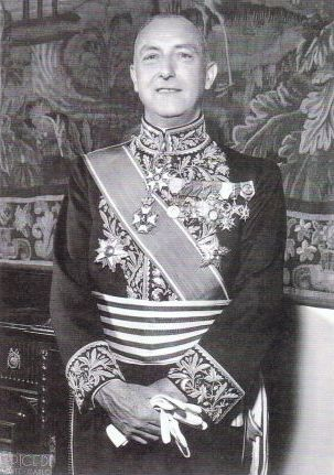 Pierre Voizard en 1953, Ministre d'Etat de la Principauté de Monaco